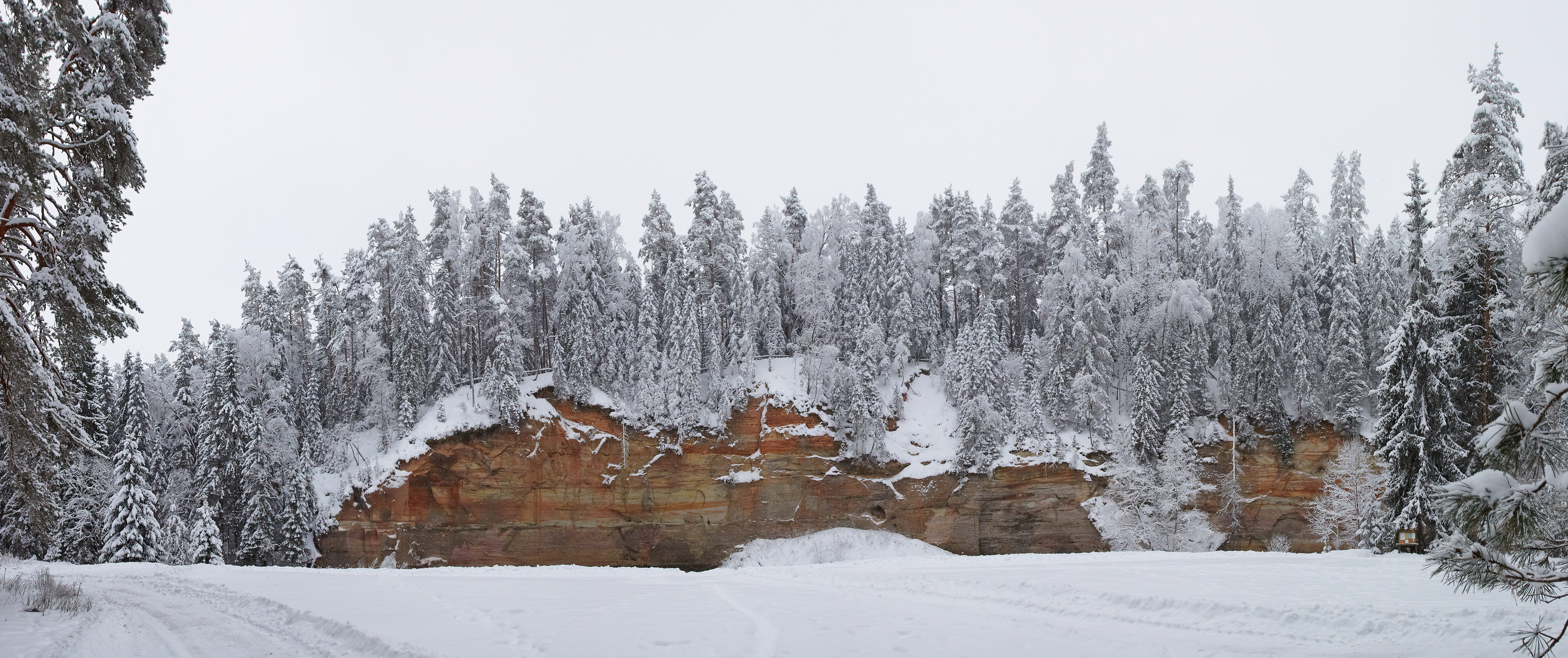 Suur Taevaskoda 2010. aasta jaanuarisEesti: Devonian sandstone at Suur Taevaskoda in January 2013